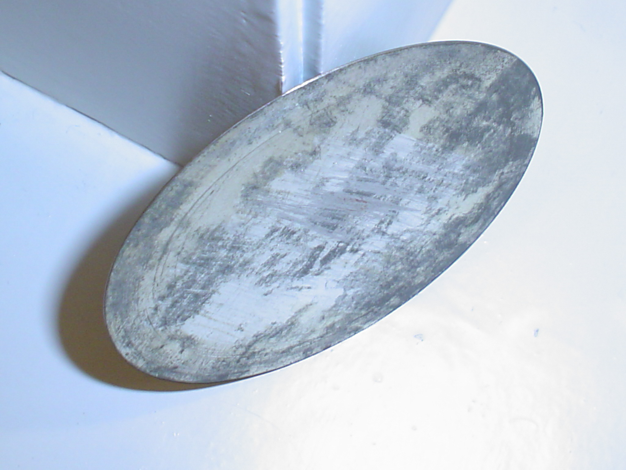 Telefonmembrano el la komencaj tempoj